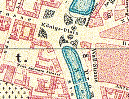 Königsplatz in Breslau, 1873